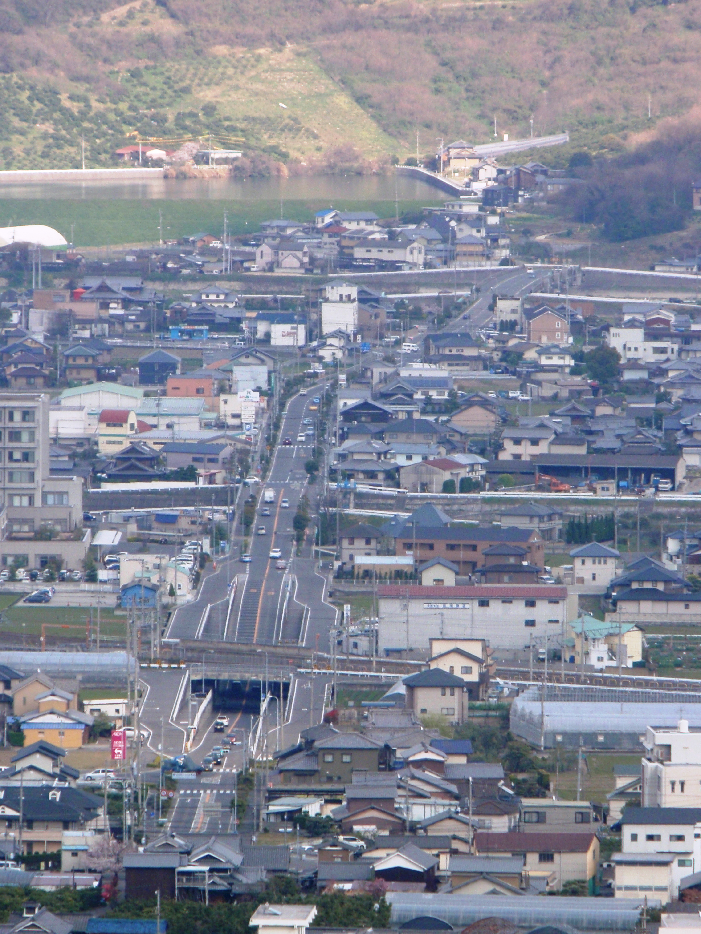 香川県高松市の市道木太鬼無線、御殿橋～終点を勝賀山から望む。